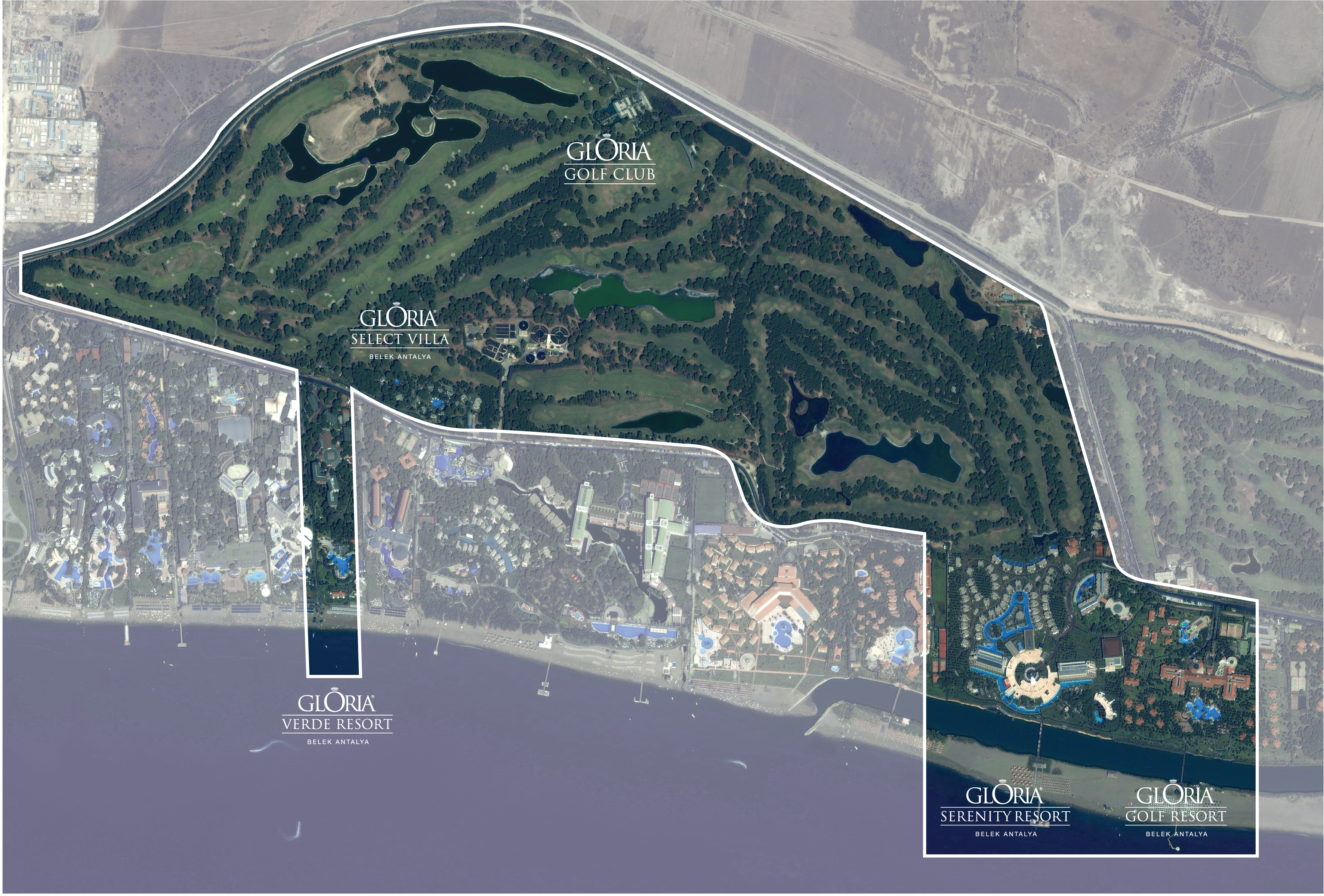 Gloria Hotels & Resorts Yerleşimi